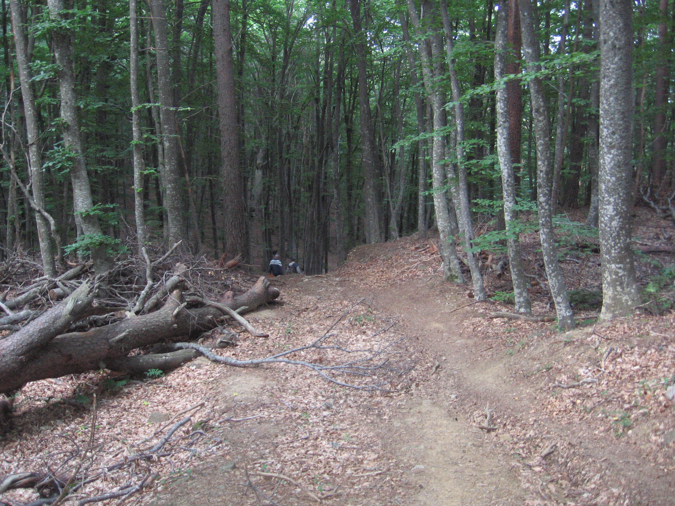 Фото